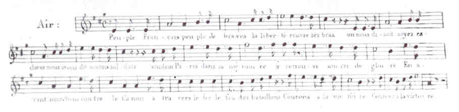 Air d'une marche militaire allemande Ein Schifflein Sah Ich Fahren par J.B. Weckerlin, harmonisé par Daniel-François-Esprit Auber pour la chanson La Parisienne de Casimir Delavigne.